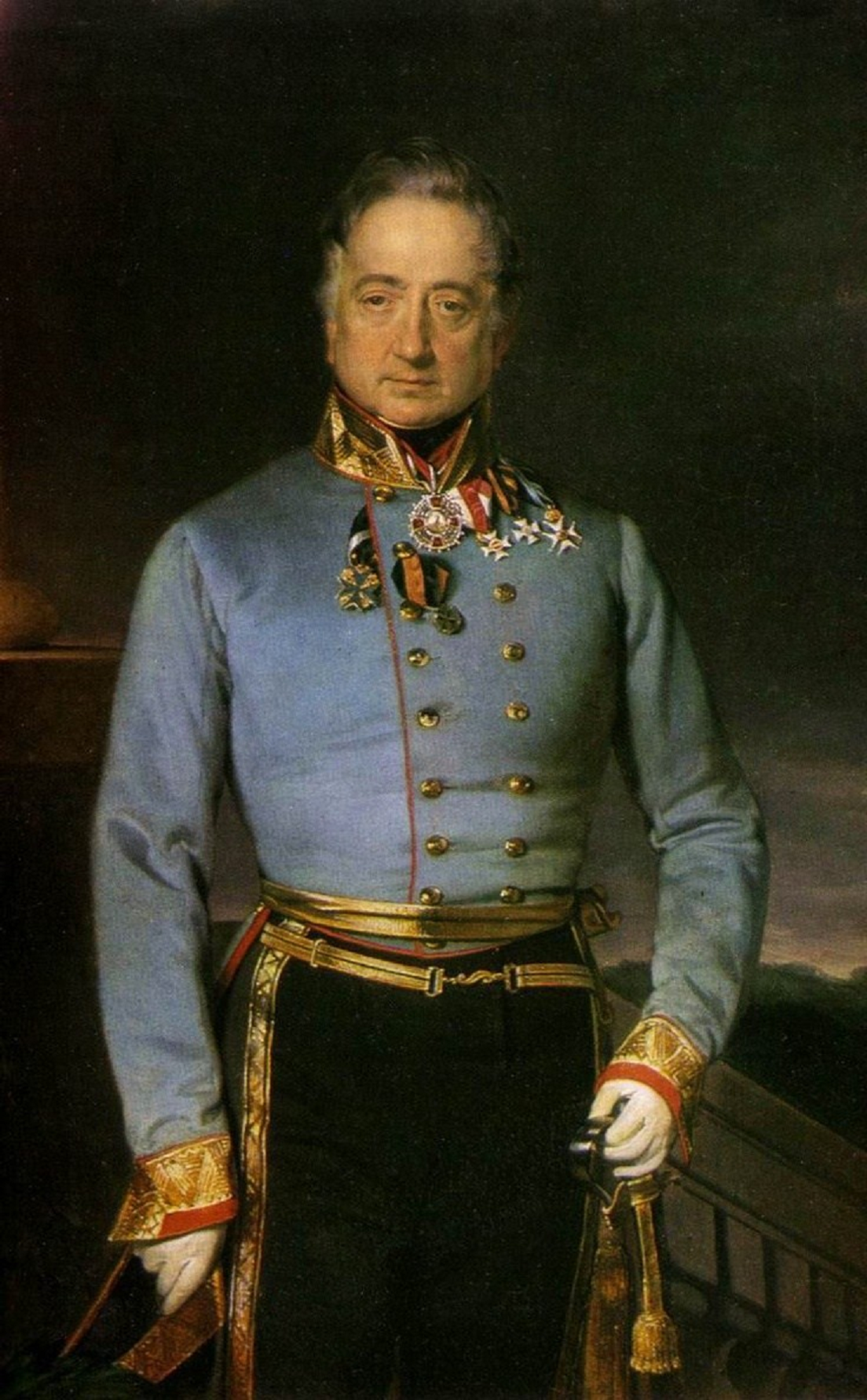 Paul Freiherr von Wernhardt 1840 (Die kunsthistorischen Recherchen ergaben noch keine neuen Angaben zum Besitzer des vorliegenden Gemäldes. Im Museum Ostdeutsche Galerie Regensburg wurde der Dargestellte als General Paul Freiherr von Wernhardt (1776 – 1846) [also nicht Bildnis des Grafen Radetzky !] identifiziert und das Entstehungsjahr auf 1840 datiert. Die Provenienz ist bislang ungeklärt. Anhaltspunkte für weitere Recherchen werden weiter überprüft. → Das Bundesamt für zentrale Dienste und offene Vermögensfragen (BADV): „Franz Eybl, Bildnis des Grafen Radetzky“; -nachgewiesenermaßen vor allem durch die von Franz Eybl danach angefertigte Lithographie, handelt es sich aber um das Bildnis des Generals Paul Freiherr von Wernhardt (1776 – 1846), wie auch im Museum Ostdeutsche Galerie Regensburg -Stand 2010- festgestellt.)